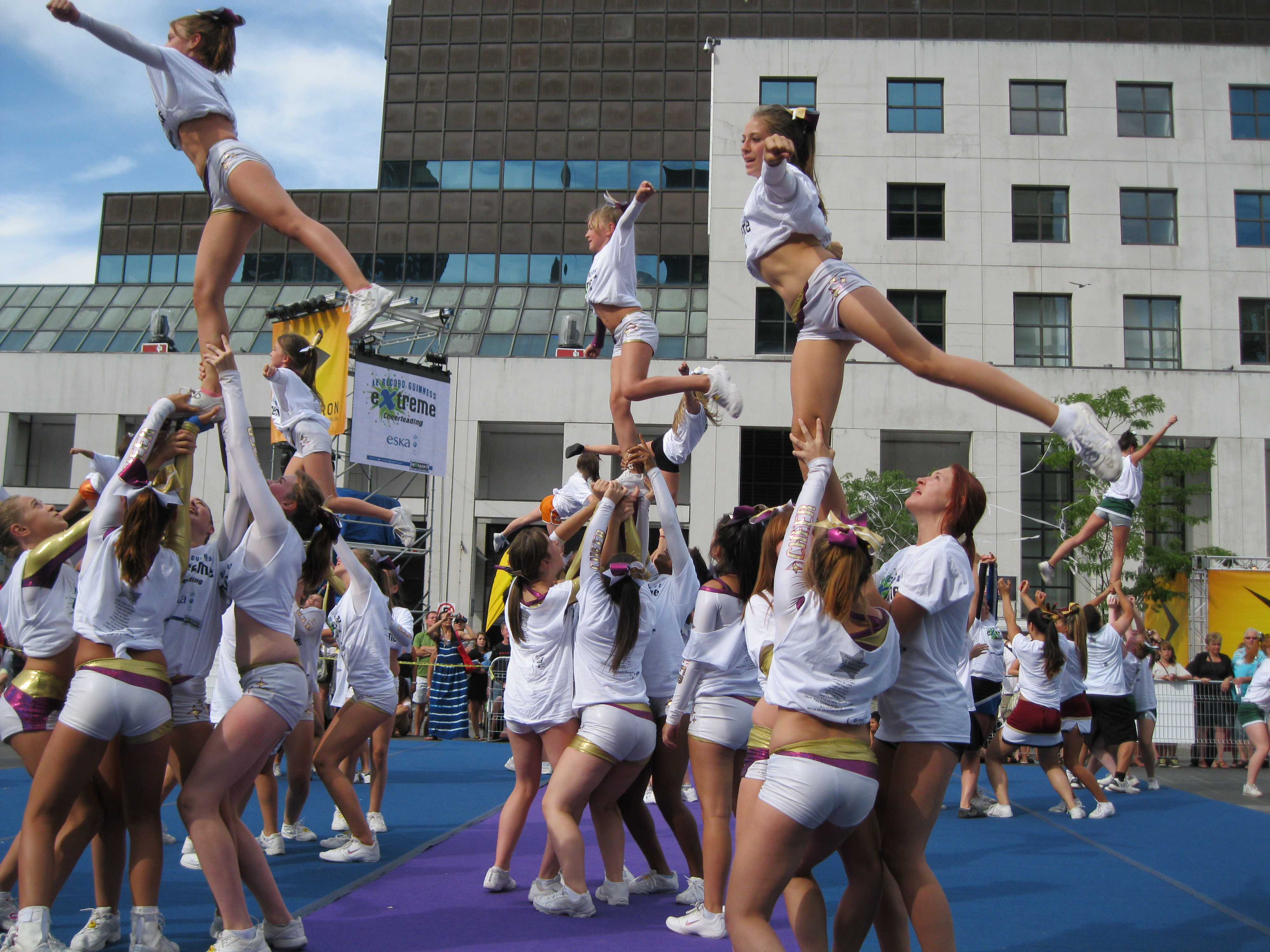 À la place des Festivals à Montréal, le 21 juillet 2012 , on a tenté de battre le record Guinness du plus grand nombre de cheerleaders réunies pour une chorégraphie (297). À la place, on a réussi la plus longue chaîne de pyramides.